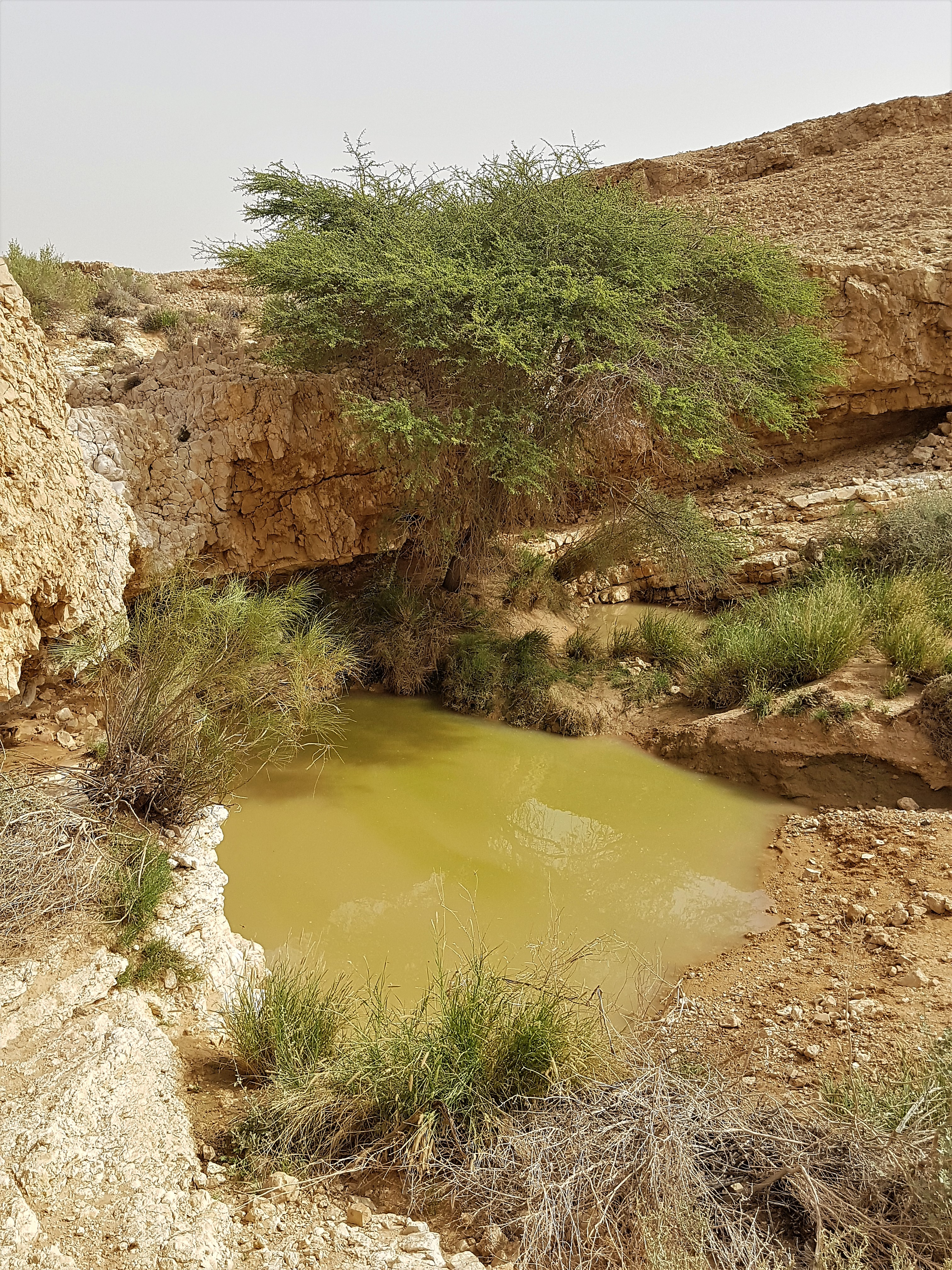 גב צופר עליון